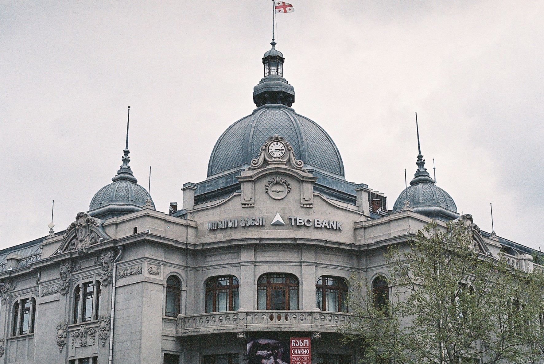 F2170021